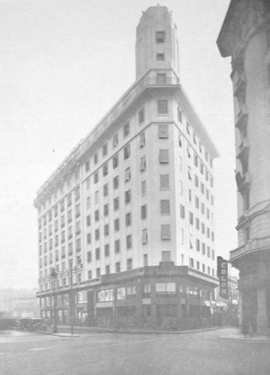 Vista del Edificio Montalegre (hoy Edificio La Unión), en la esquina noroeste de la Diagonal Norte y la calle Esmeralda. Barrio de San Nicolás, ciudad de Buenos Aires, Argentina.